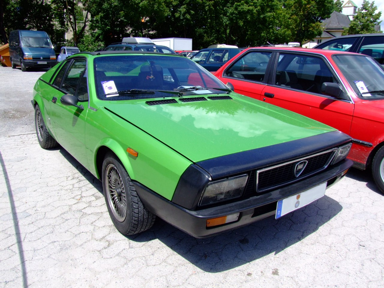 Lancia Monte-Carlo Pininfarina